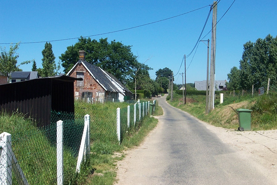 Houquetot